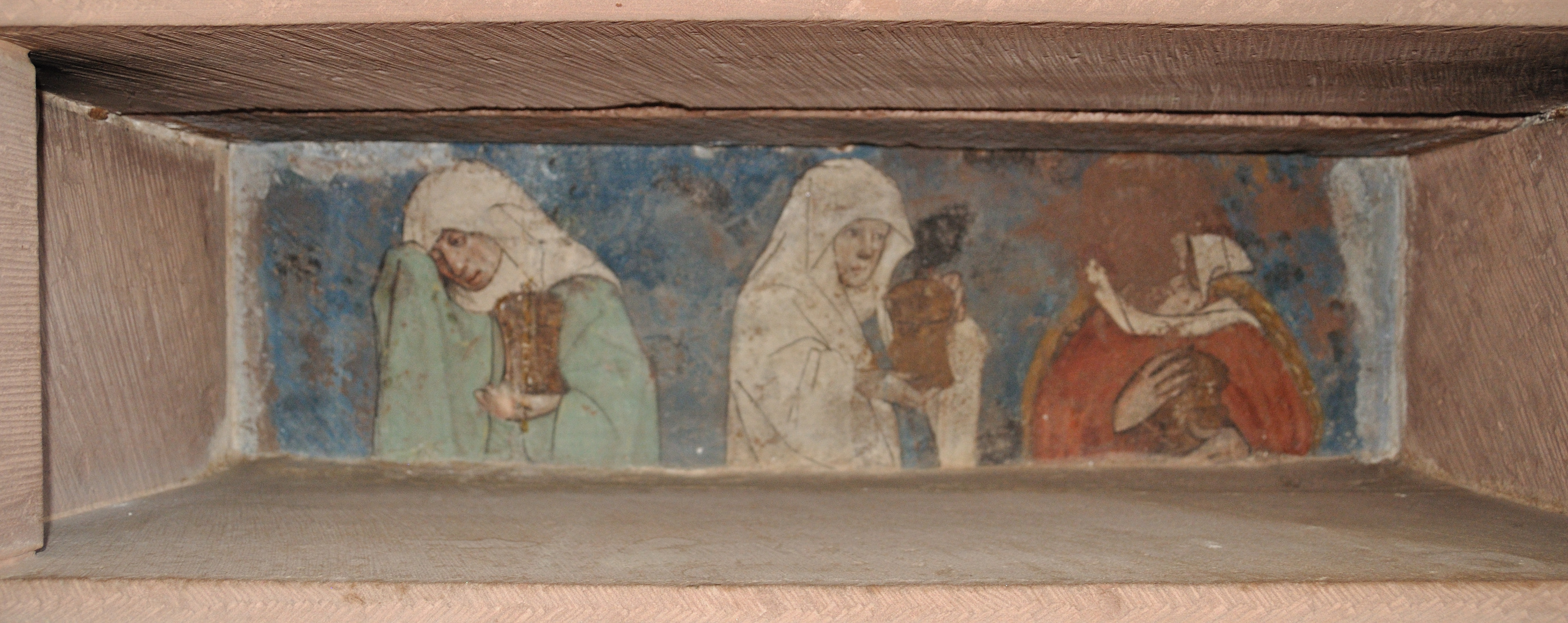 Tüllingen: Sakramentschrein in der Ottilienkirche (Detailansicht)